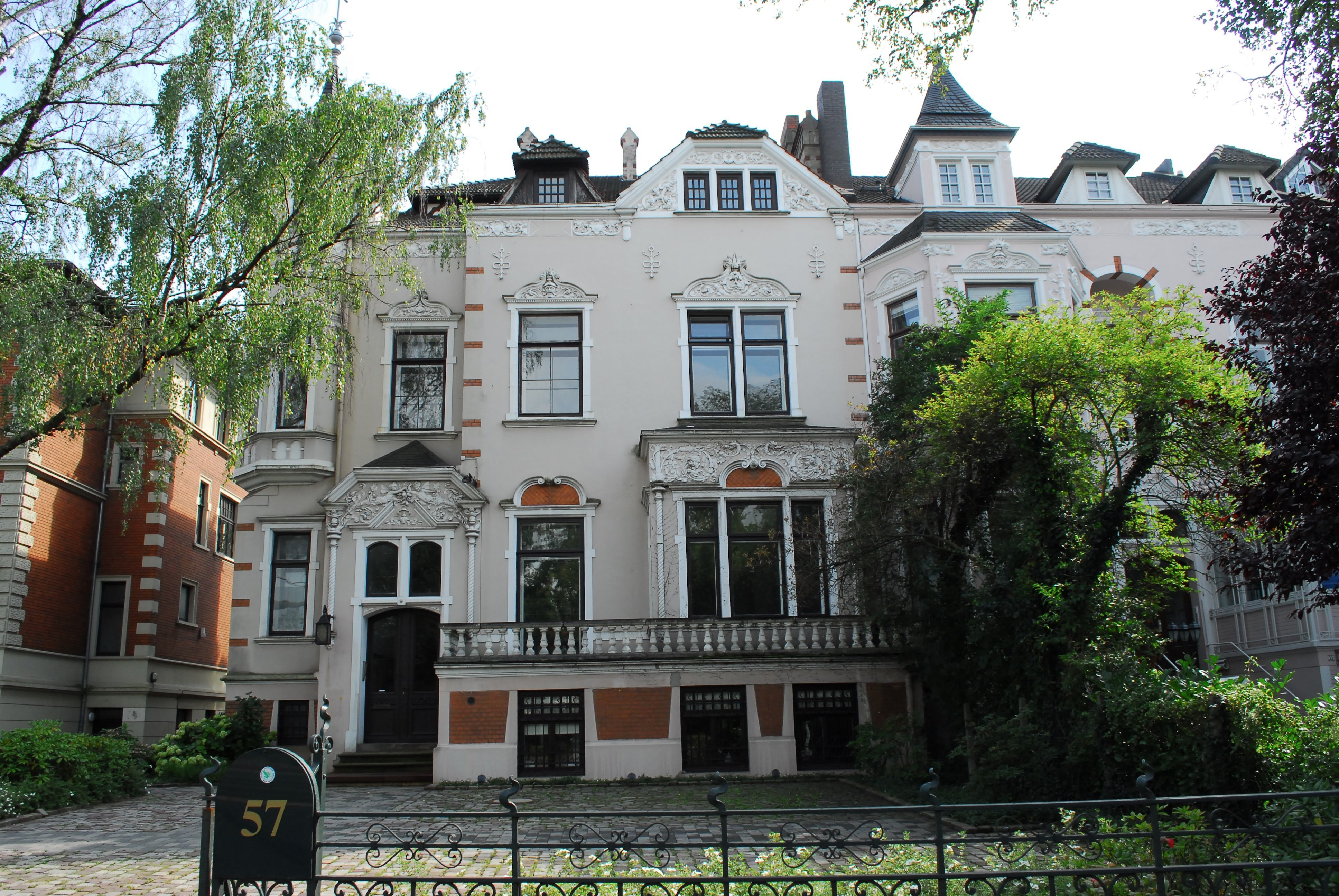 Wohnhaus in Bremen, Schwachhauser Heerstraße 57.Das abgebildete Objekt ist ein geschütztes Kulturdenkmal in der Freien Hansestadt Bremen, mit der Nr. 1119 beim Landesamt für Denkmalpflege registriert.